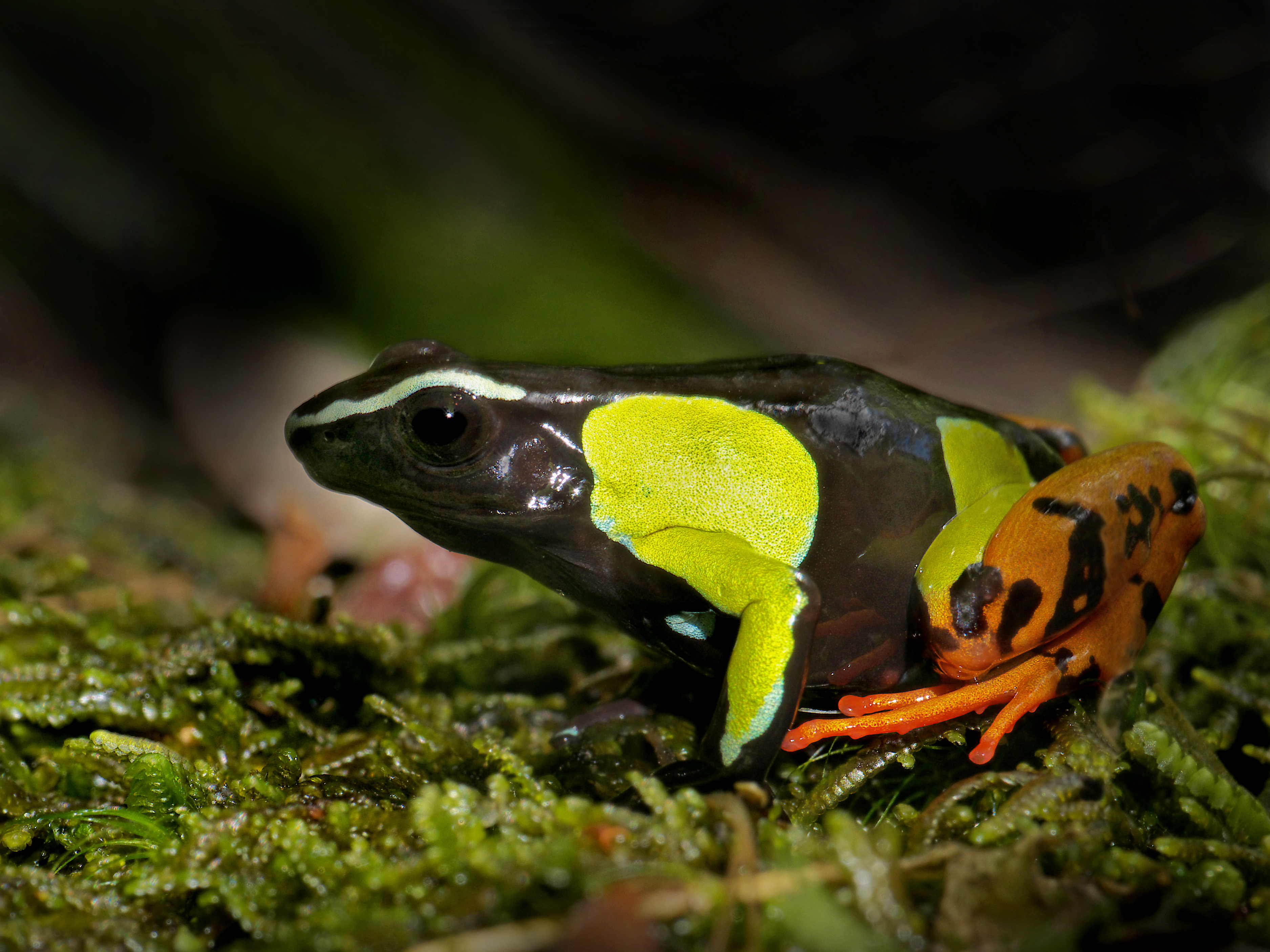 Panasonic GX7 + Leica DG Macro-Elmarit 45mm F2.8 ASPH OIS